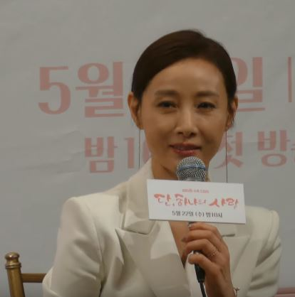 21일 오후 서울시 강남구 논현동 임피리얼 팰리스 서울에서 KBS 2TV 새 수목드라마 ‘단, 하나의 사랑’ 제작발표회가 열려 배우 김명수X김인권X김보미X도지원X이동건X신혜선이 참석해 기자 발표회 종료 인사와 본방 사수를 부탁하고 있다.